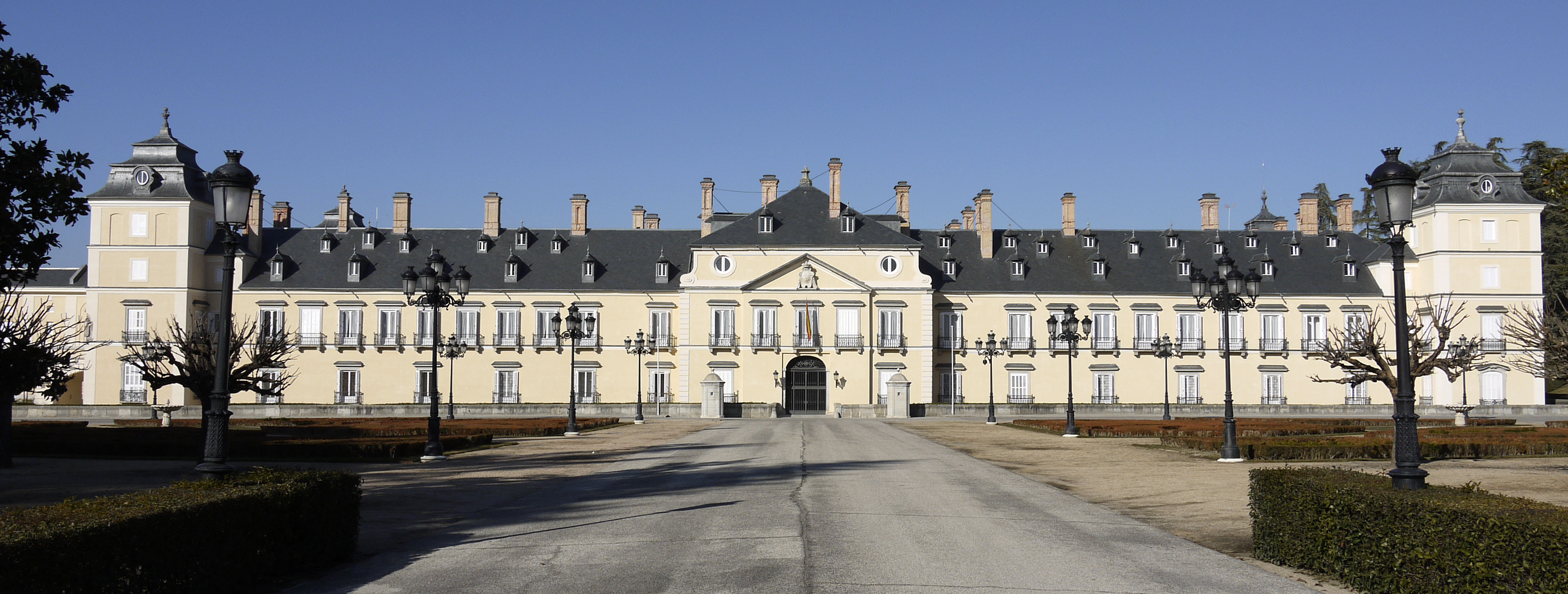 Palacio Real de El Pardo, Madrid, España